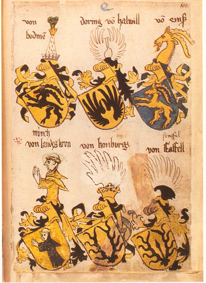 Ingeram-Codex der ehemaligen Bibliothek Cotta von/bodme(r) doring vo(n) halwill vo(n) emß münch/ von landeskron von honburg von staffell/ [staffel]